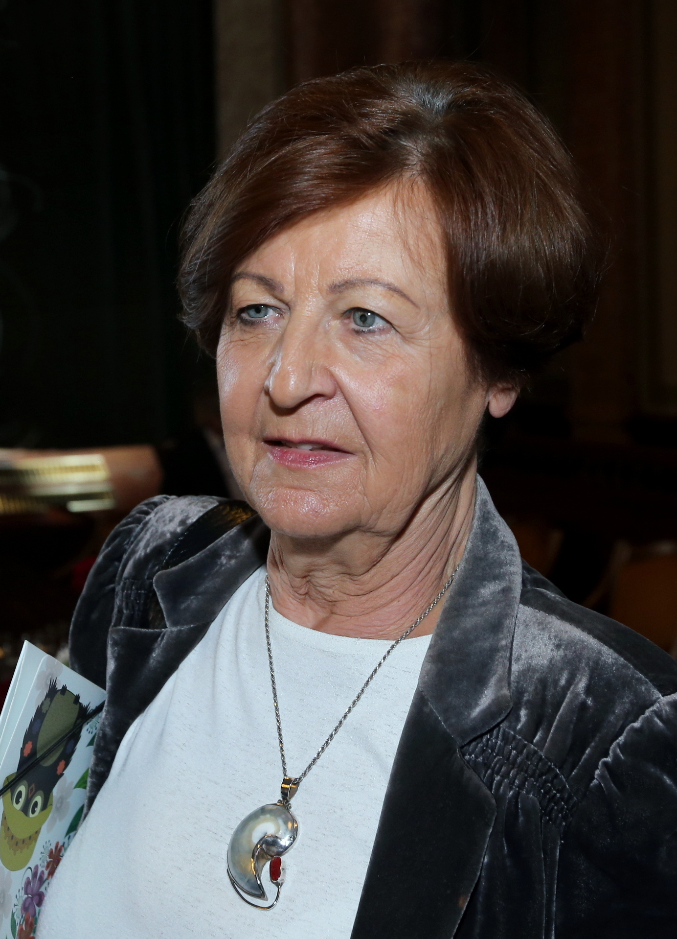 Bagdy Emőke